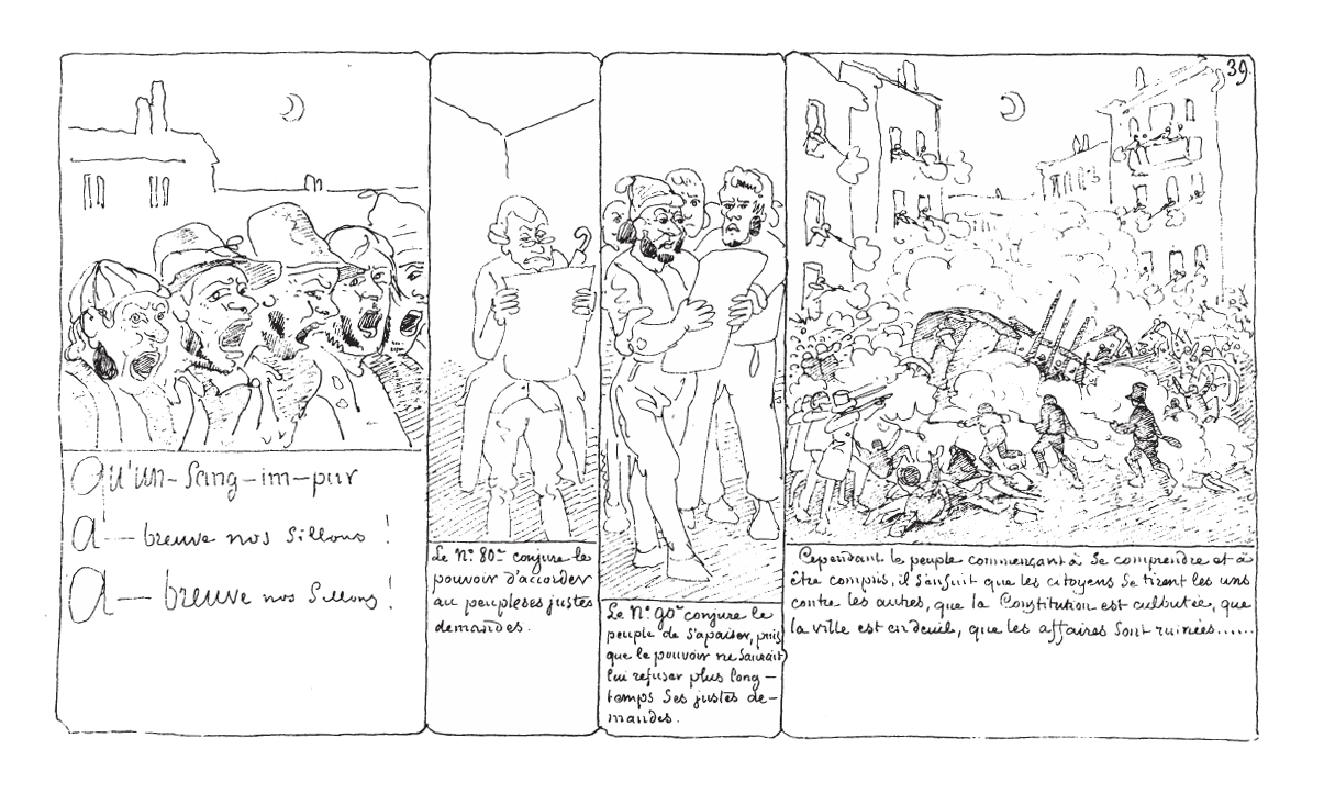 Page 39 d'Histoire d'Albert